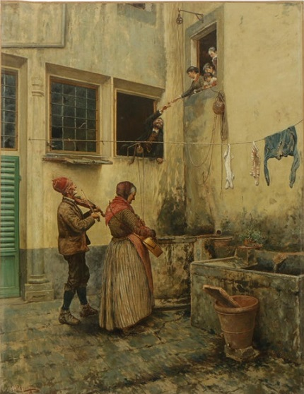 La proposta, olio su tela, 60 x 77 cm., coll. privata